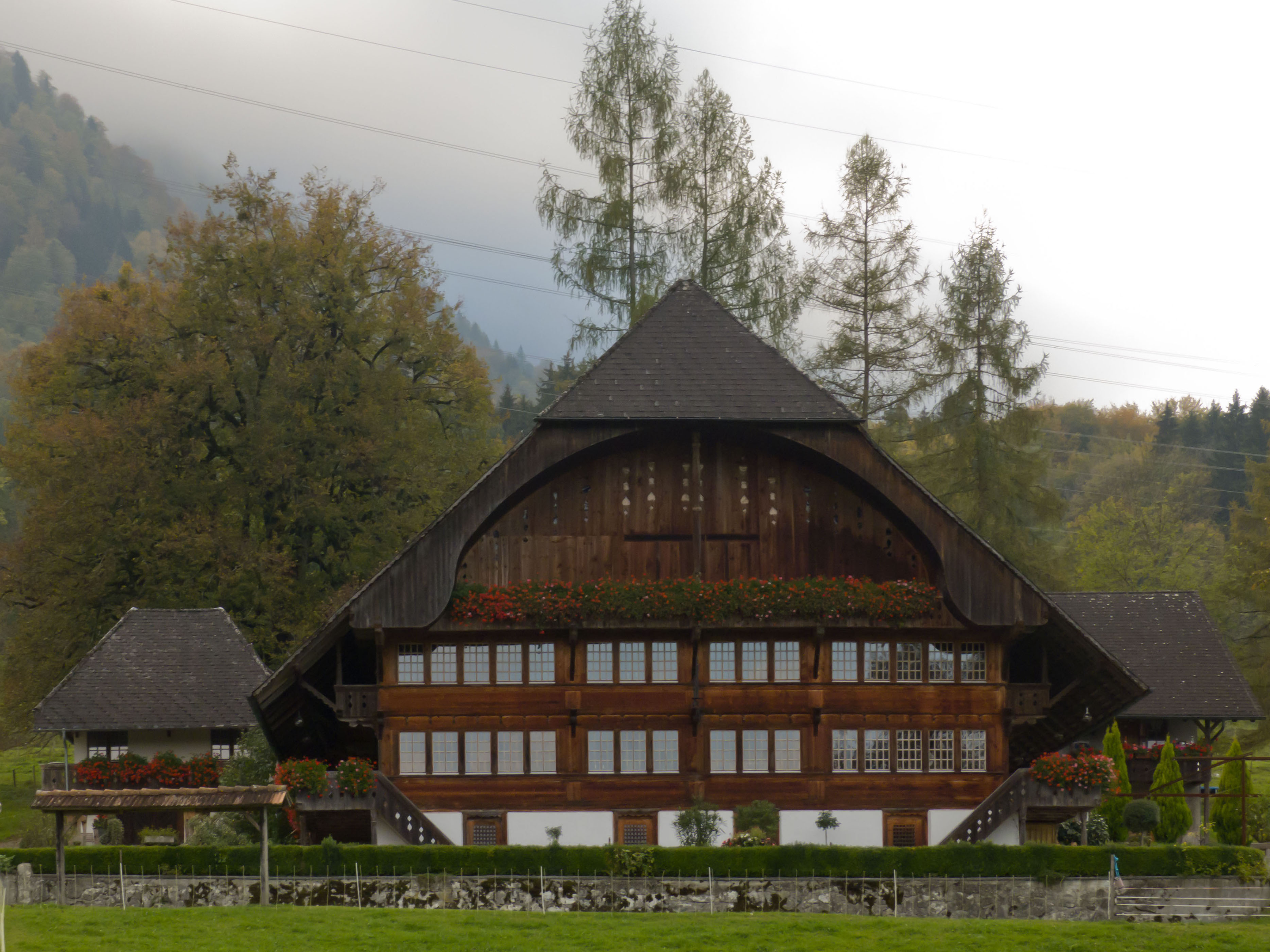 Pohlern, Bauernhaus Rohrmoos